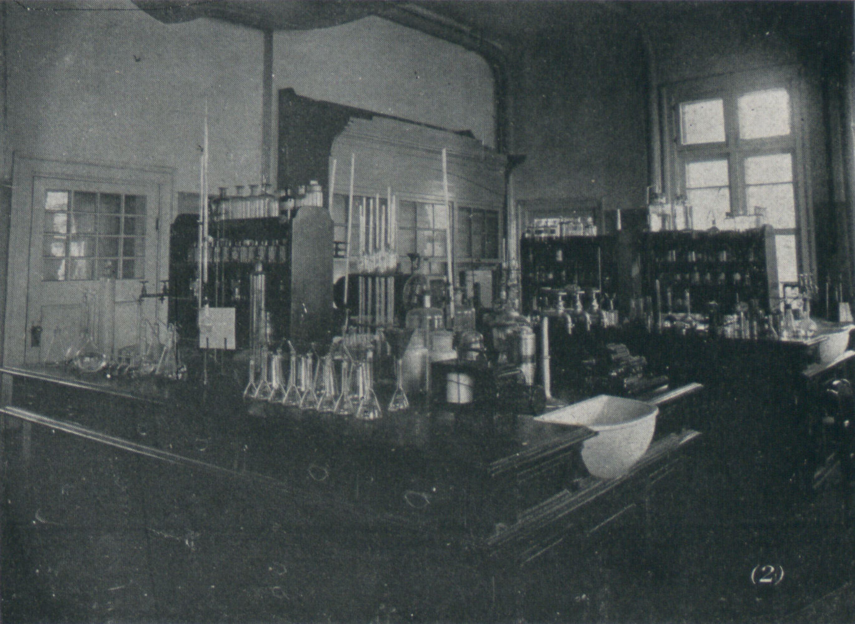 中文（台灣）: 打狗檢糖所廳舍全景